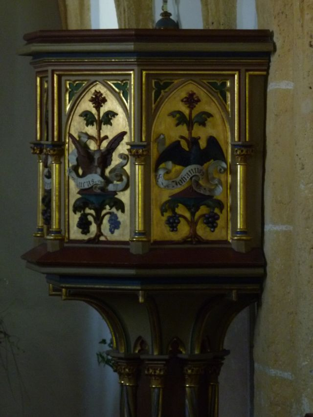 Kanzel der Filialkirche Gois